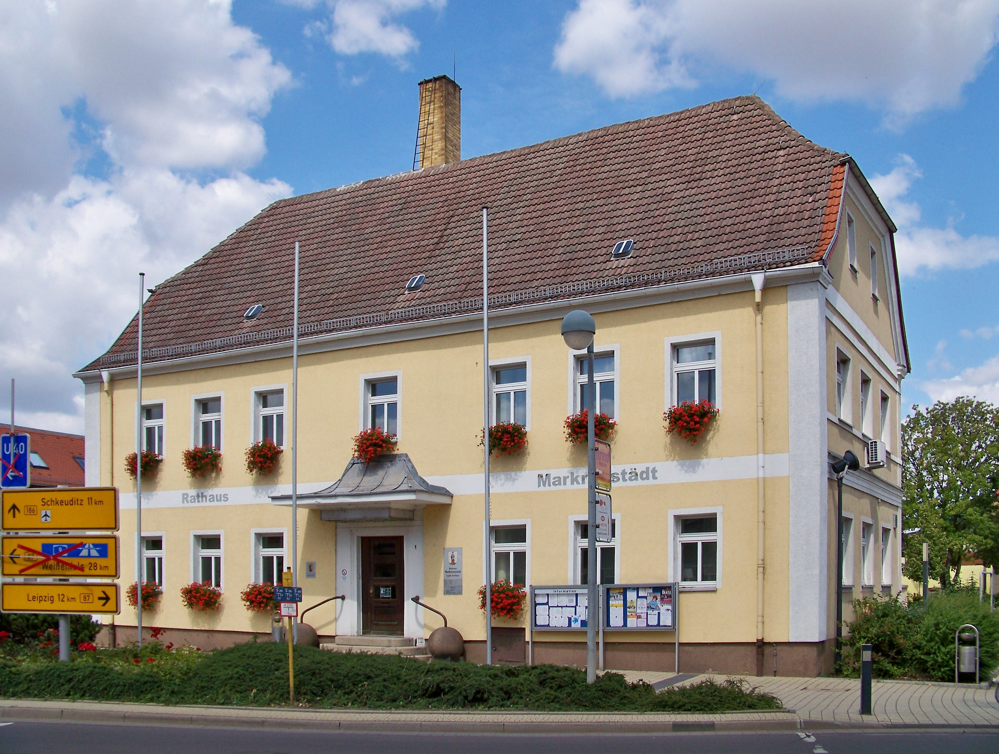 Rathaus von Markranstädt bei Leipzig